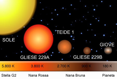 Confronto tra stelle varie